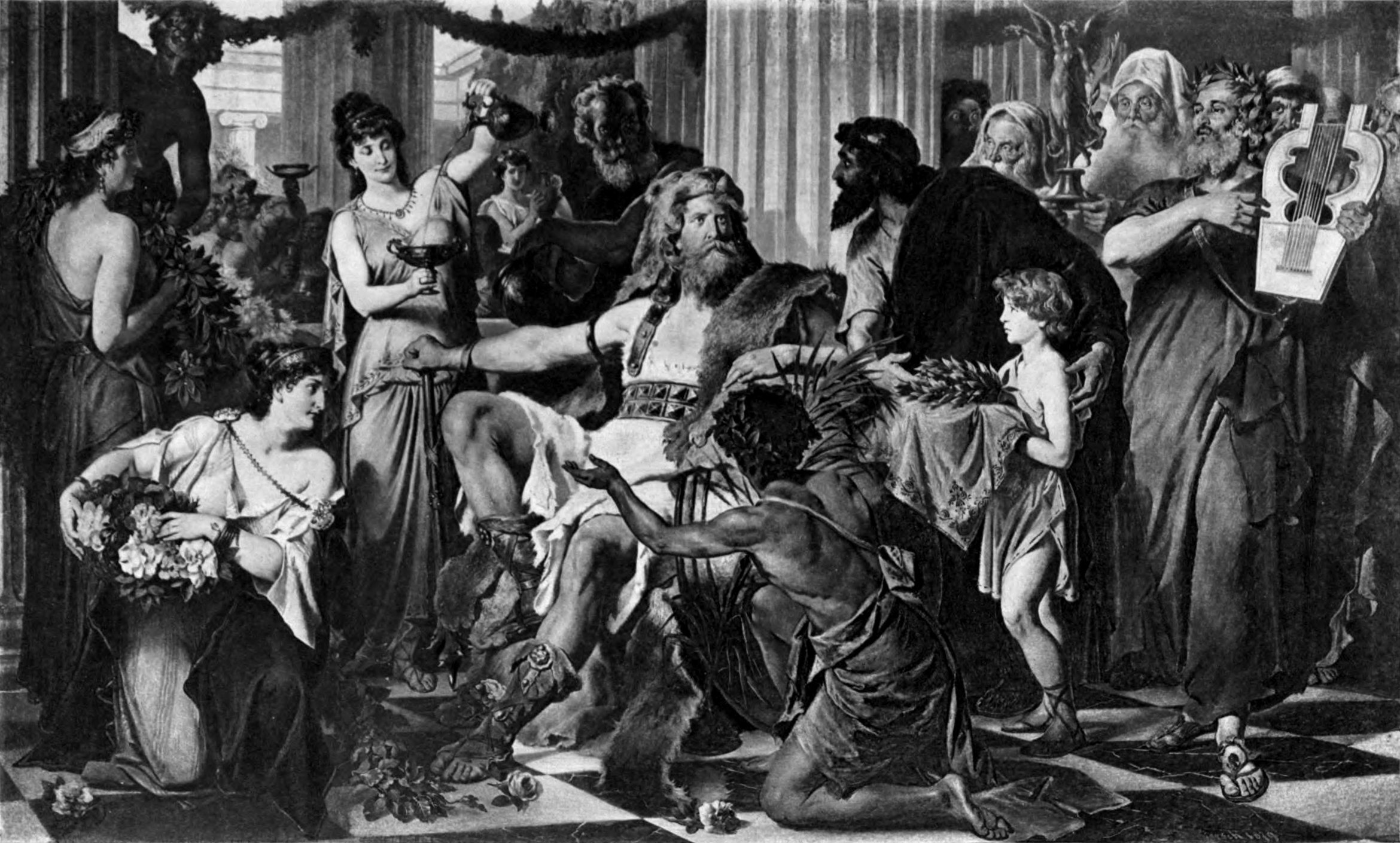 Alaric à Athènes